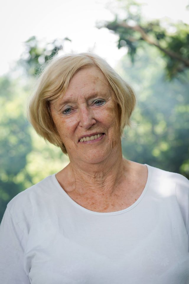 Tine Ruysschaert op 80-jarige leeftijd